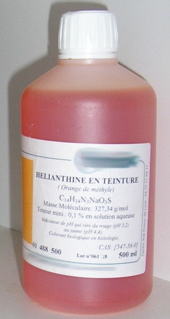 Flacon d'Hélianthine (marque tronquée)